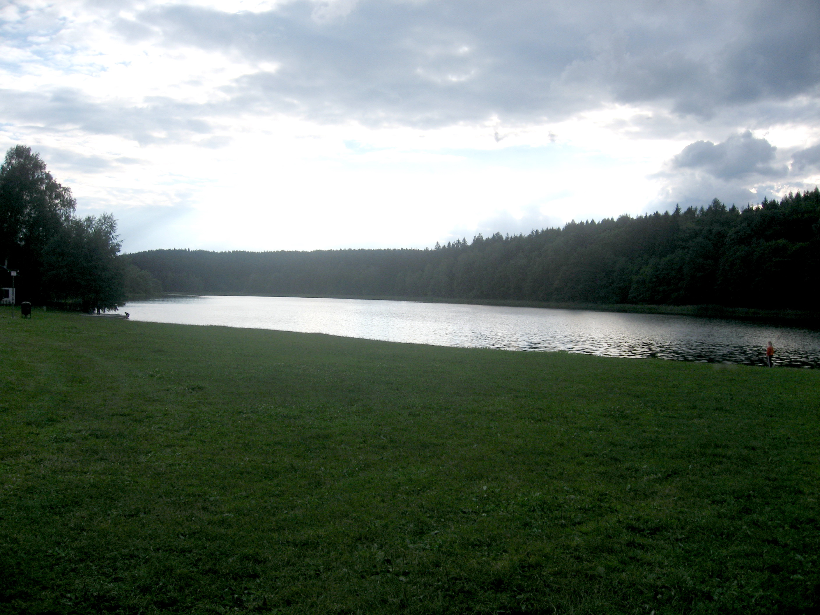 Kachlička